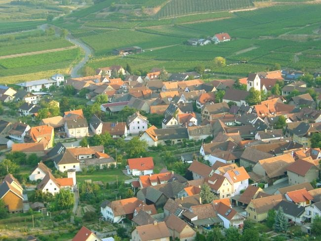 Luftbild von Bischoffingen aufgenommen bei einer Ballonfahrt